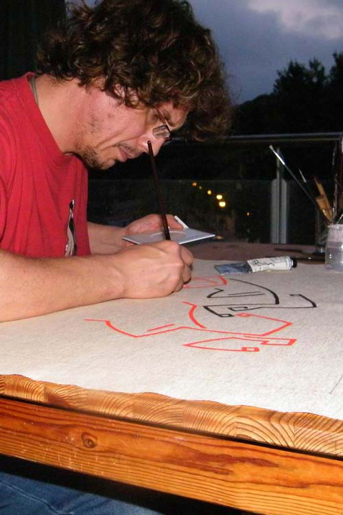 Raffaello Fabio Ducceschi dipinge il quadro su tela con colori acrilici "100 m."